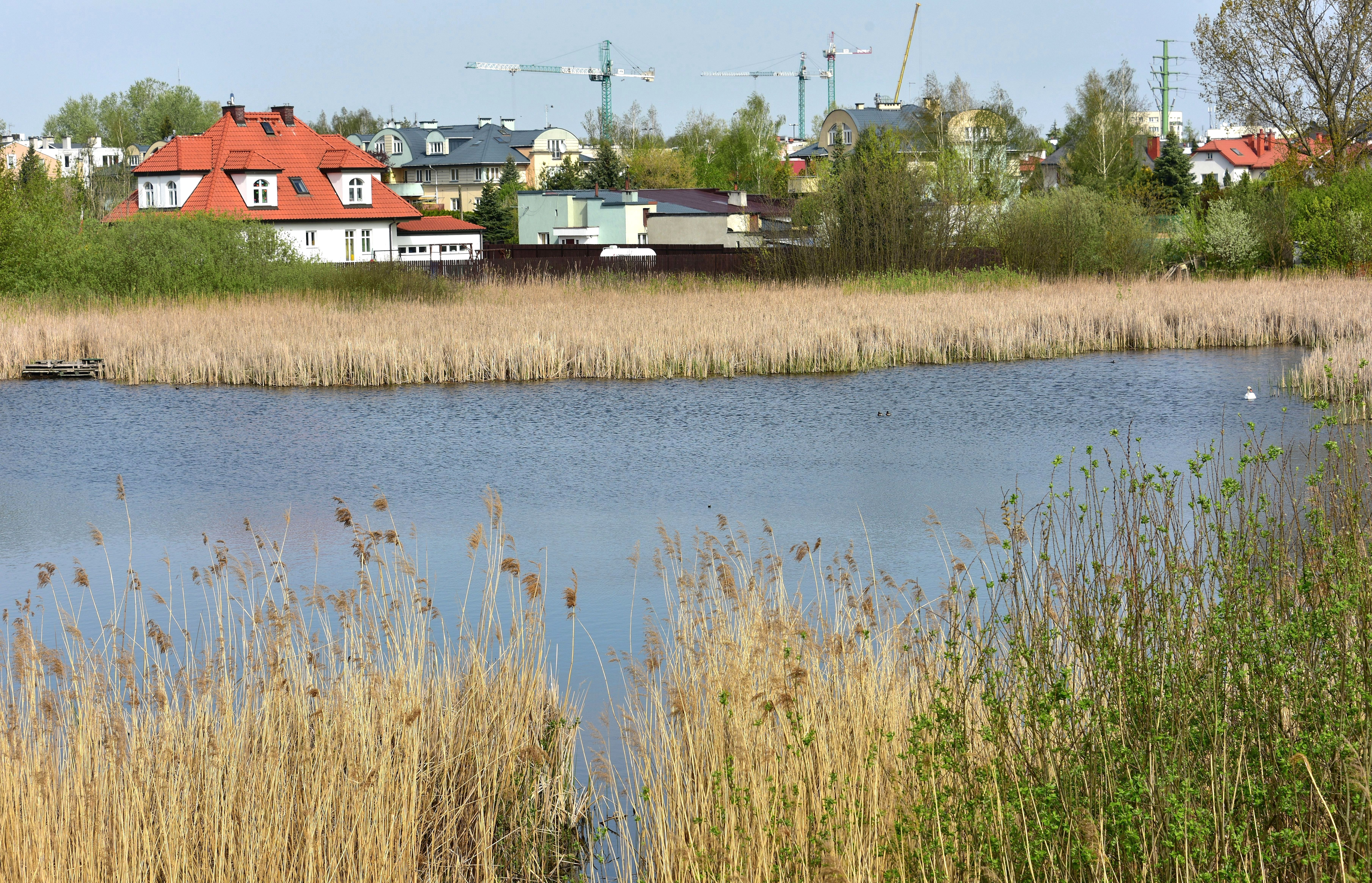 Jezioro Imielińskie w Warszawie